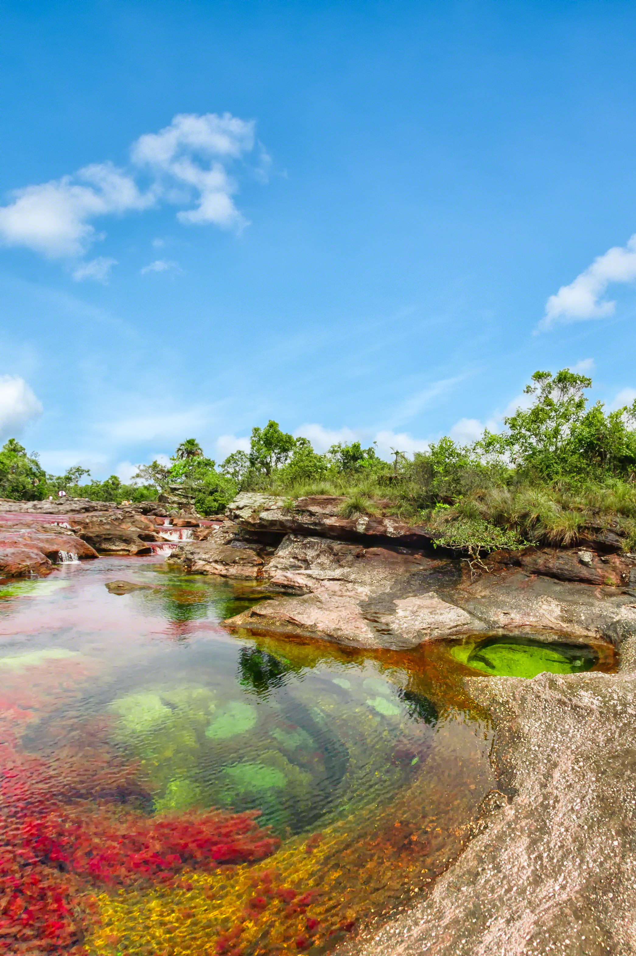 En las formaciones rocosas del sector llamado “Los Ochos”, hay unos pequeños huecos circulares, similares a unos jacuzzis, formados en el transcurrir de miles de años. En el fondo es posible observar diversos colores, rojo, amarillo, verde, naranja… Es todo un espectáculo visual. Inigualable. Fotografía por Mario Carvajal, Licenciada con Creative Commons Reconocimiento 3.0 Unported. Usted puede usar esta imagen en cualquier proyecto, inclusive con fines comerciales, siempre y cuando otorgue el crédito de autoría y el vínculo hacia el proyecto de Caño Cristales, correctamente. (